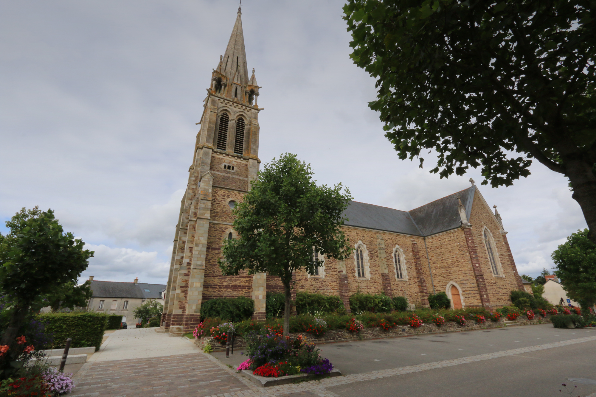 Église de Goven